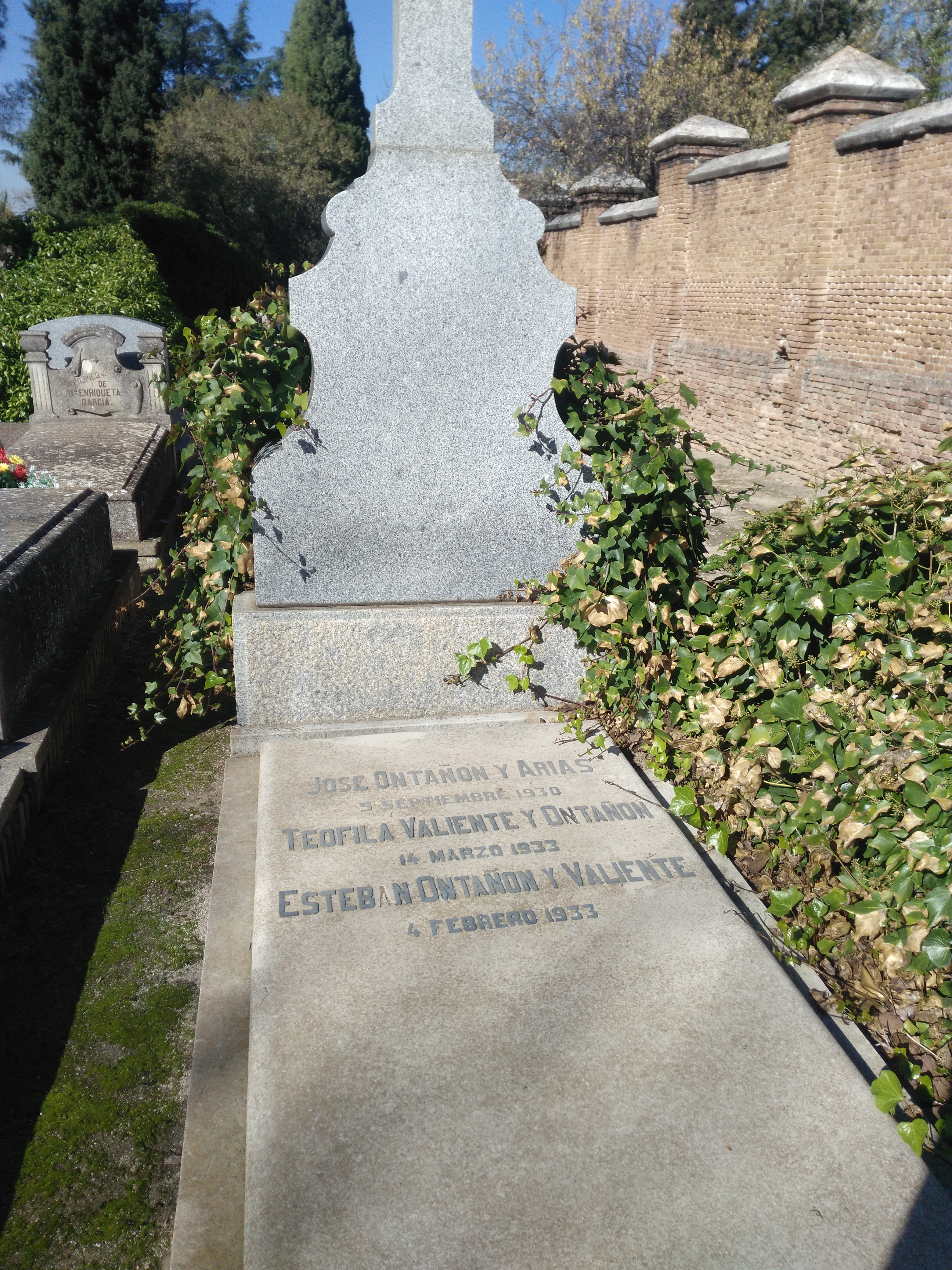 Tumba de José Ontañón Arias, Teofila Valiente y Ontañón y Esteban Ontañón y Valiente; en el cementerio civil de Madrid.